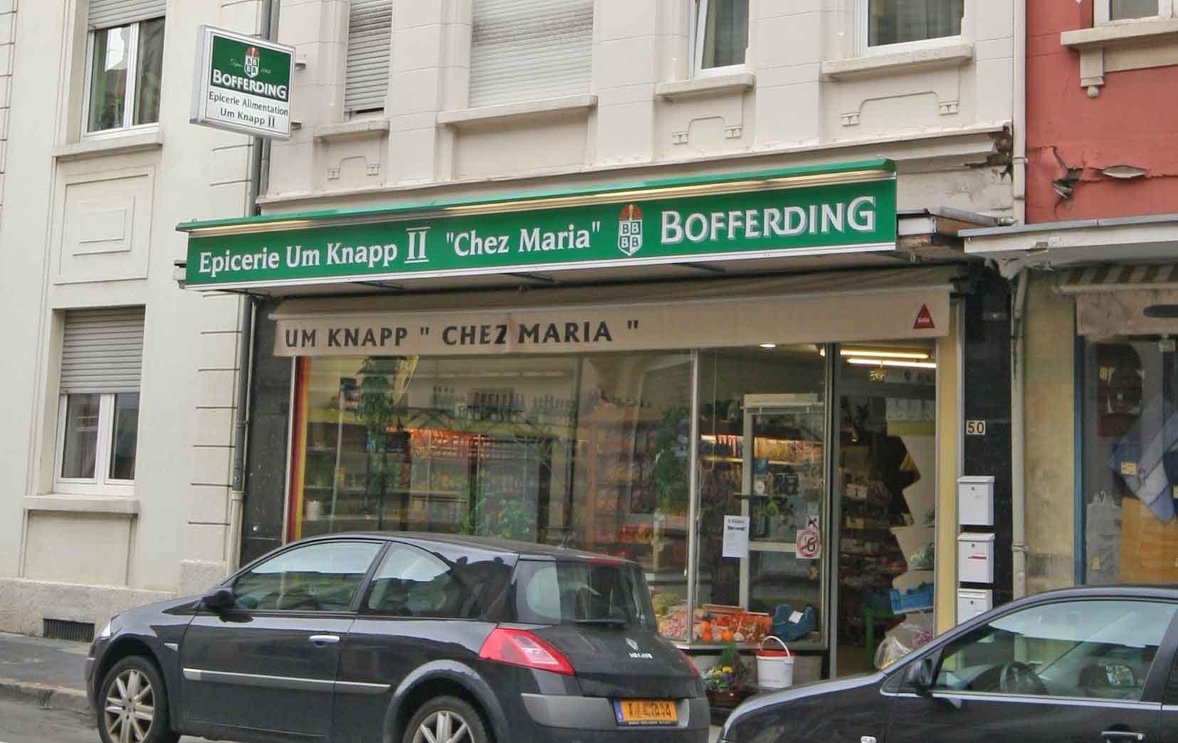 Perl oder Pica Epicerie.